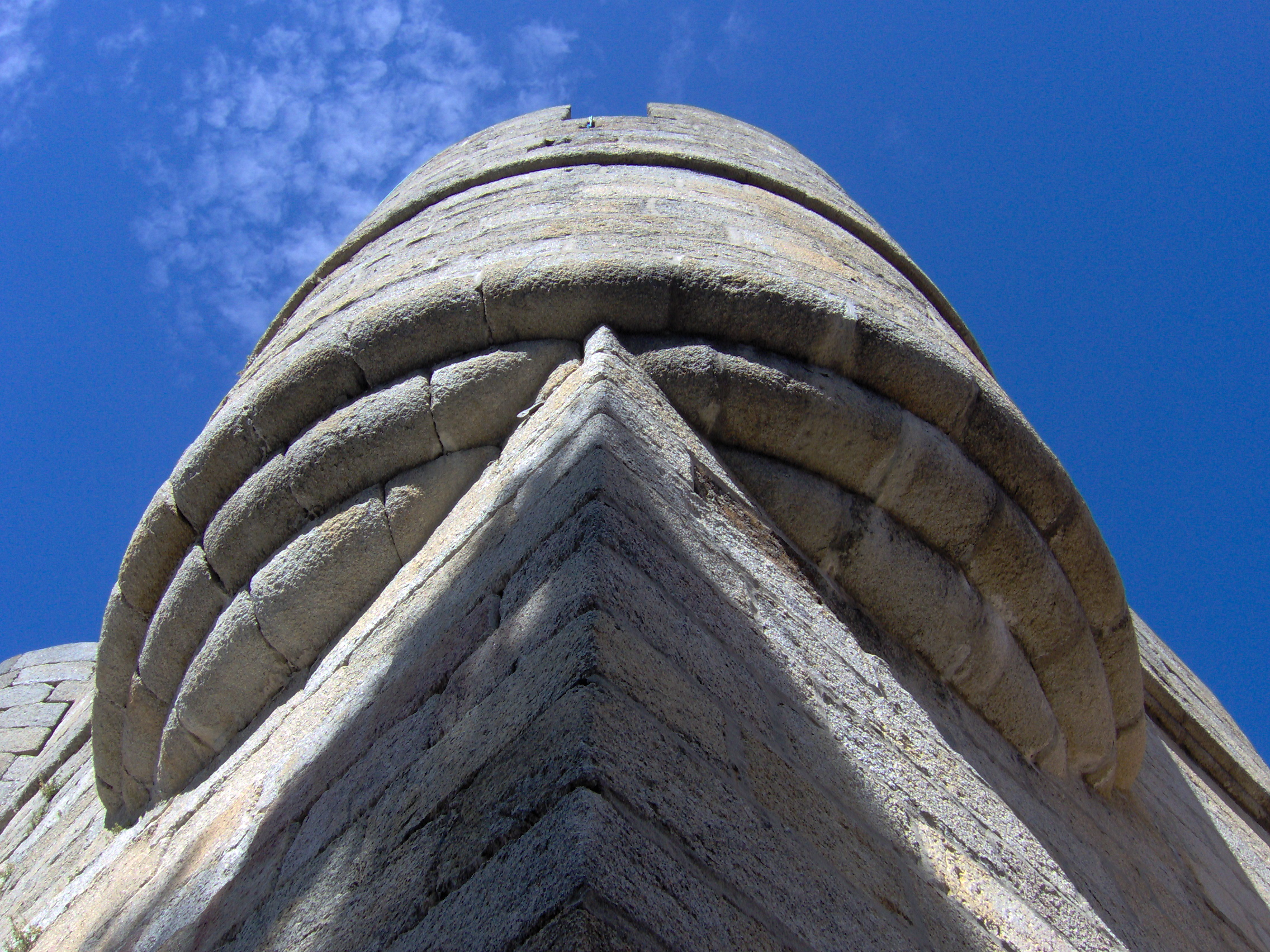 Castillo condes de Benavente, Puebla de Sanabria. Detalle de esquina.